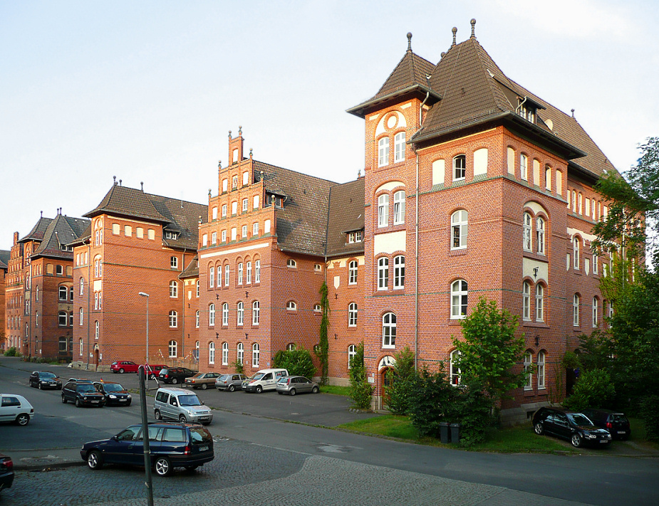 Hof der ehemaligen Kurhessen Kaserne Hann. Münden